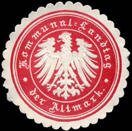 Sealing stamp Title: Kommunal - Landtag der Altmark Description: rot, weiß, geprägt Place: Altmark size: 4 cm